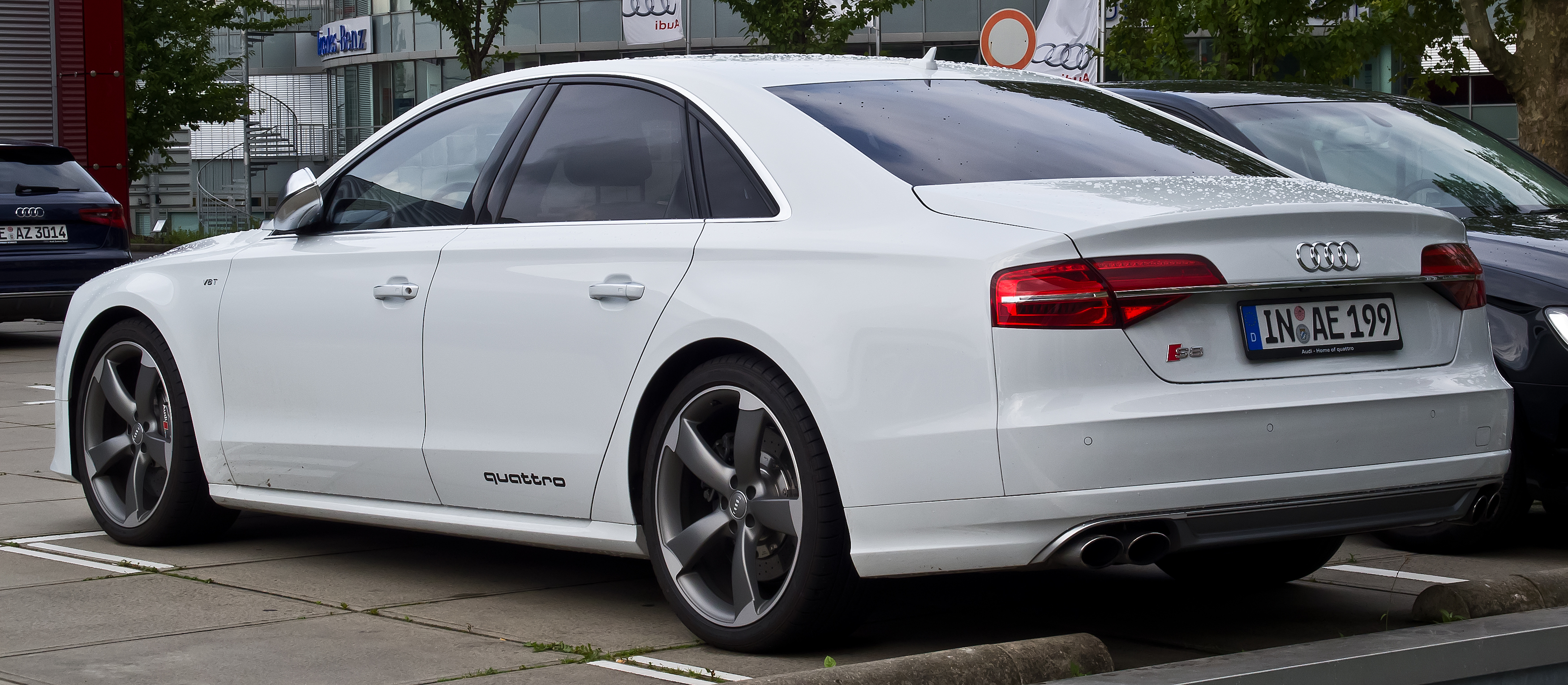 Audi S8 (D4, Facelift)